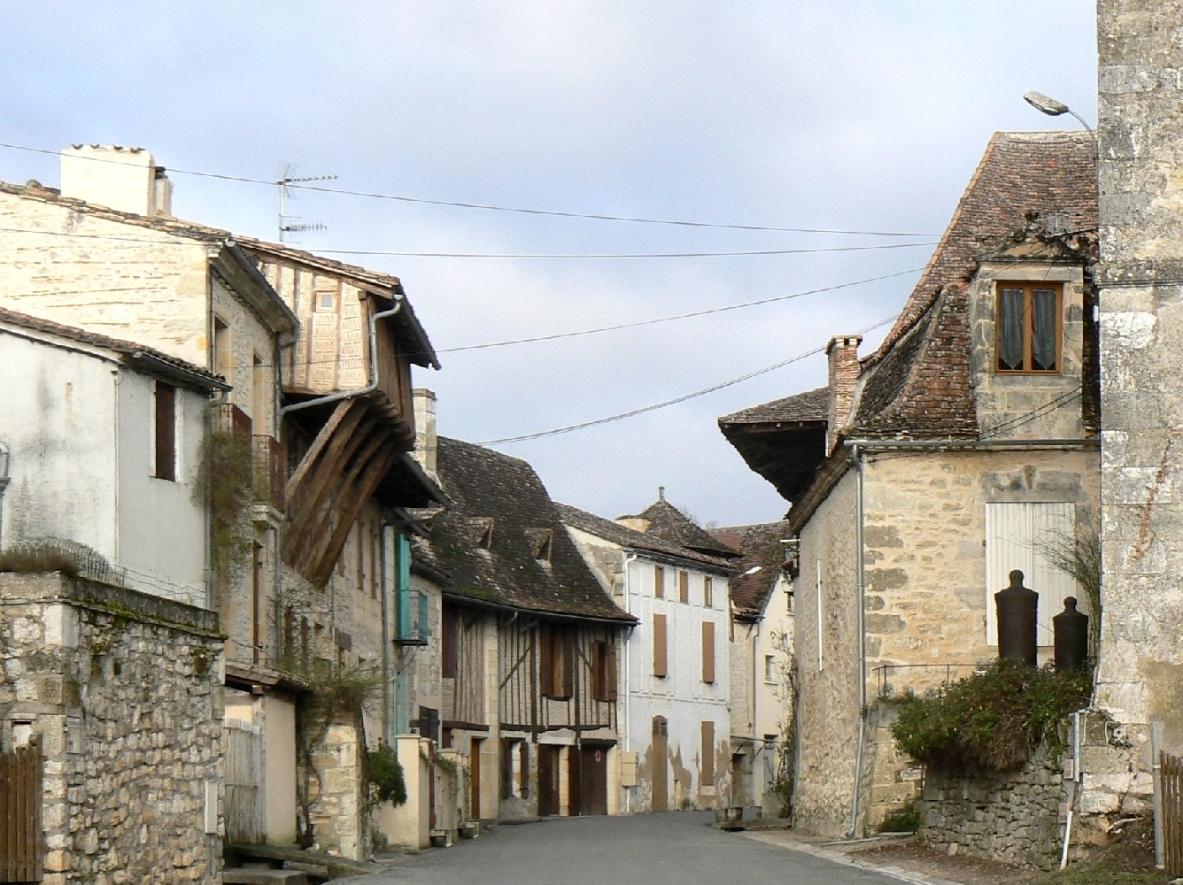 Photo de la Rue du Port en 2008 (surnommée également : Rue aux canons, rue des canons, rue de l'hôpital, etc...).